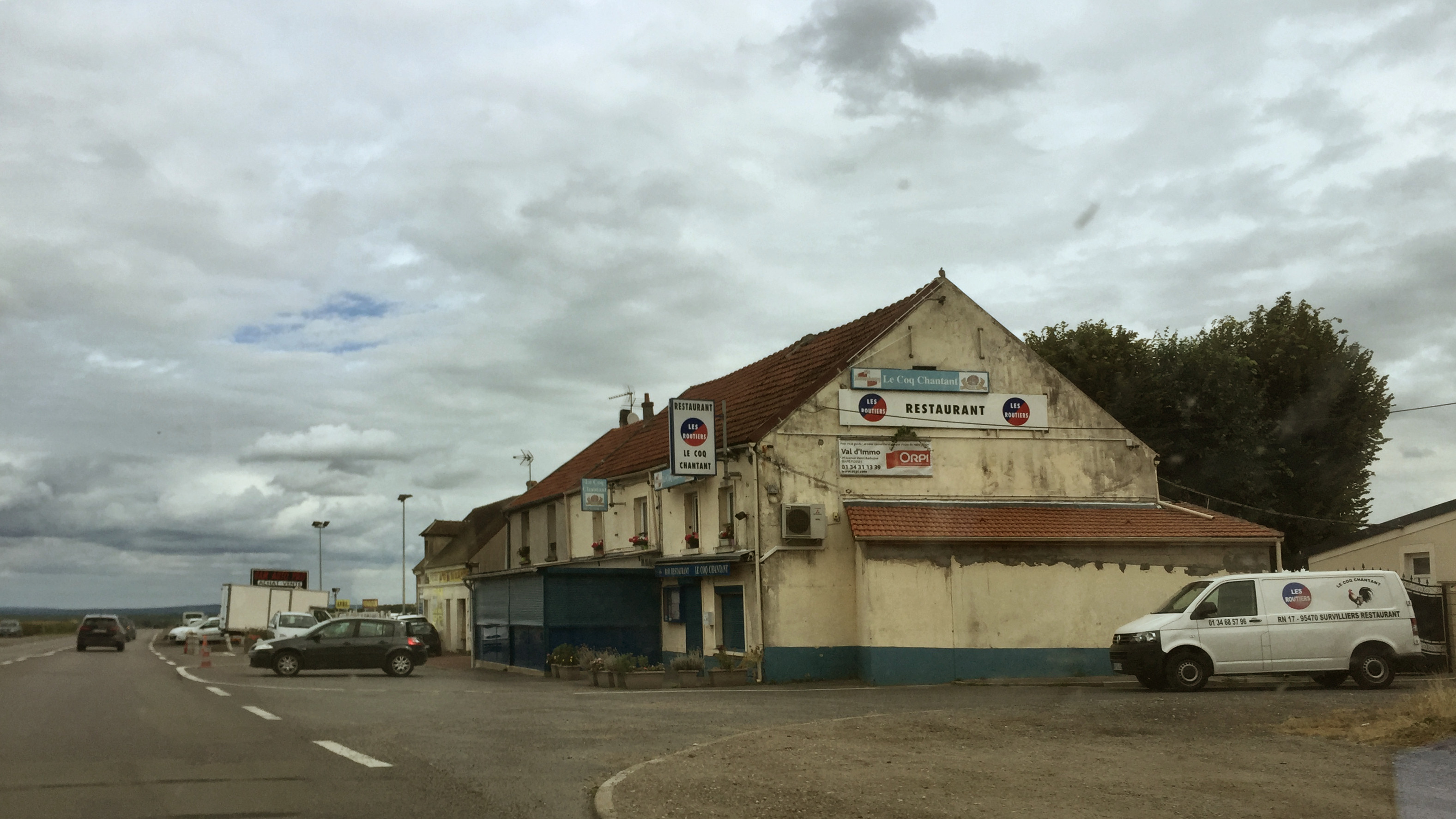 Een restaurant aan de voormalige Route Nationale 17 in Frankrijk